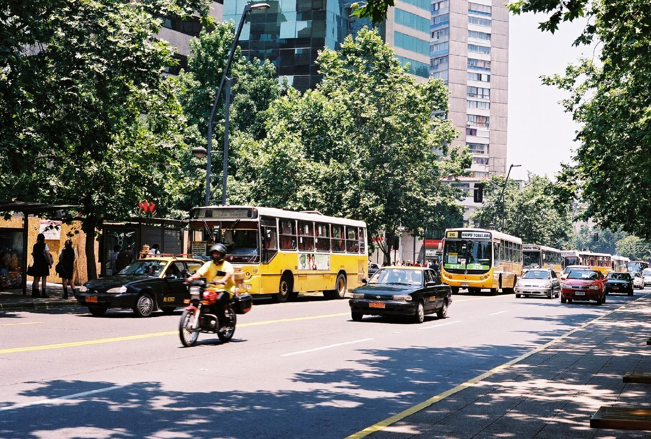 Antiguas micros amarillas, en Providencia, Santiago.